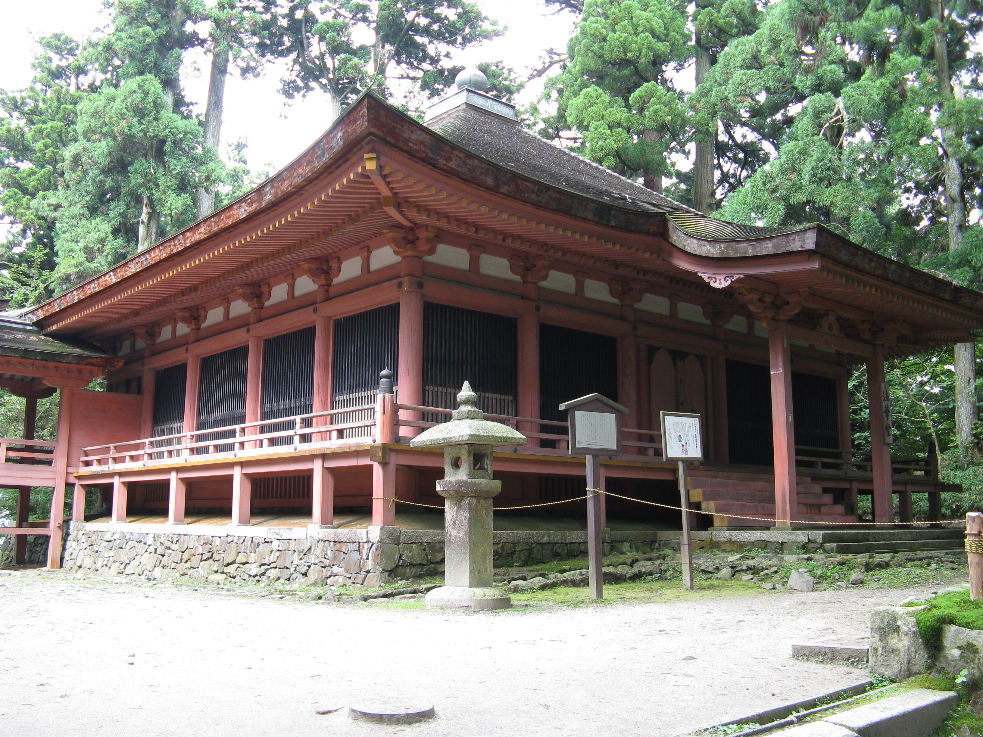 延暦寺 法華堂